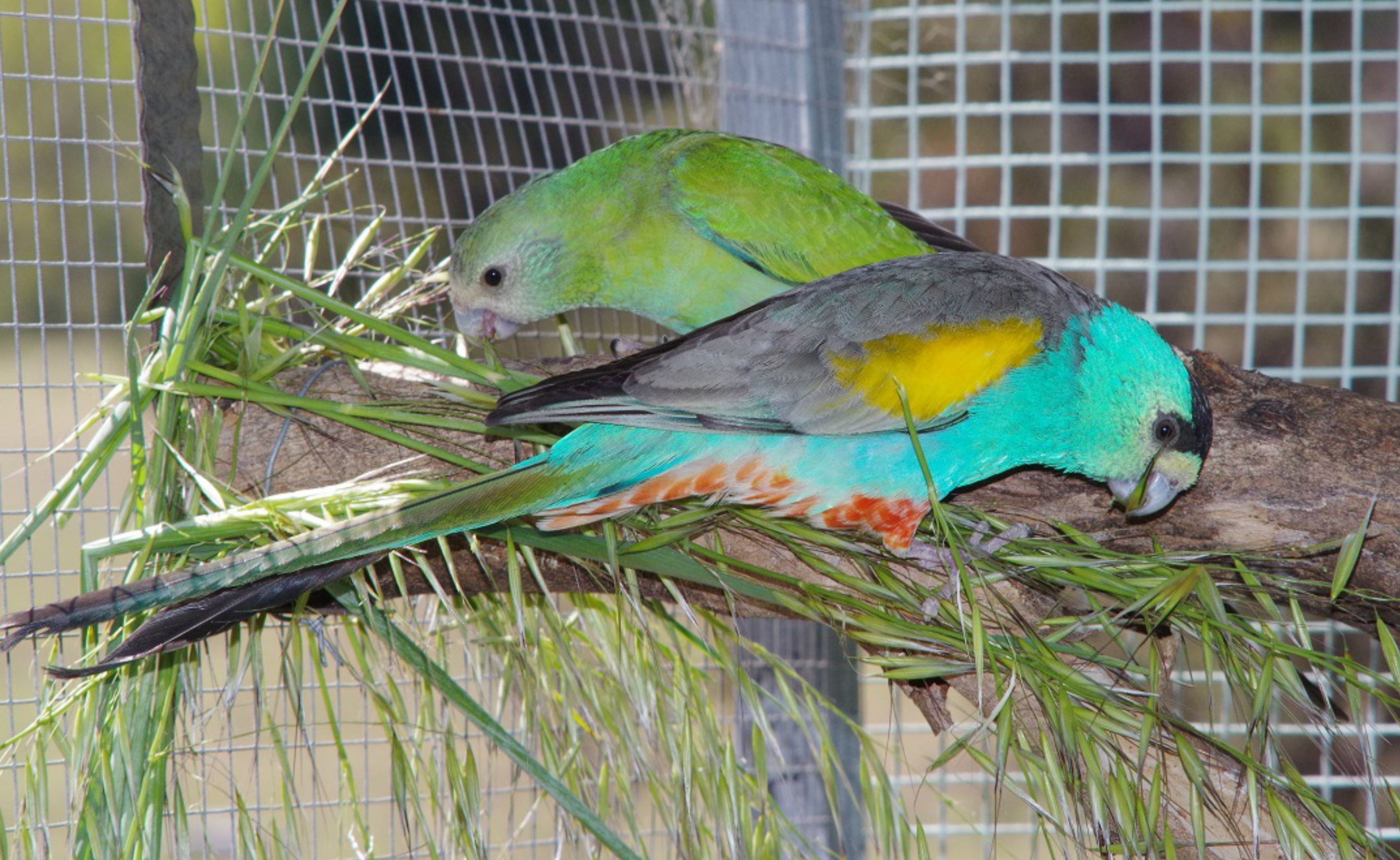 Captive bred Golden shouldered pair.